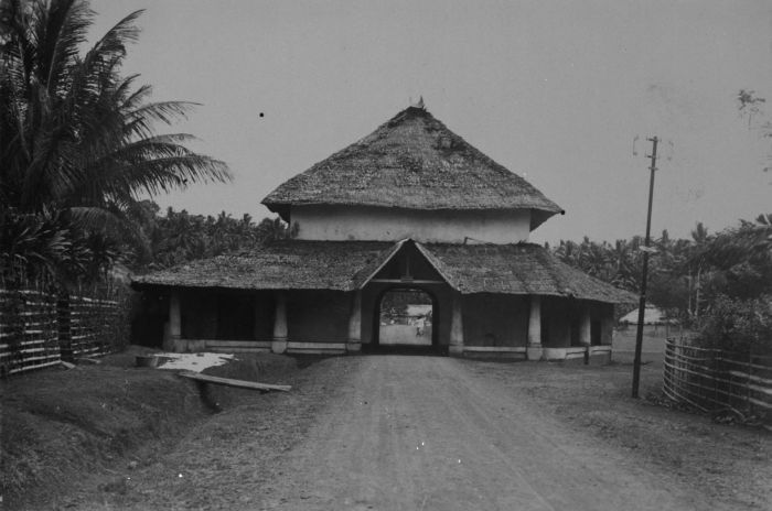 Foto. Poort bij Sultanspaleis te Ternate